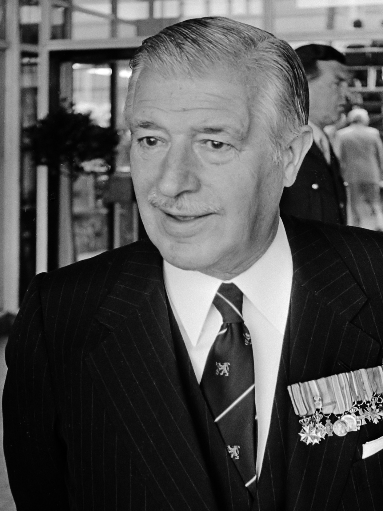 Prins Bernhard woont lustrumcongres van de Bond van Nederlandse Oorlogs- en Dienstslachtoffers in Utrecht bij ere voorzitter BNOD van Lanschot 17 mei 1980